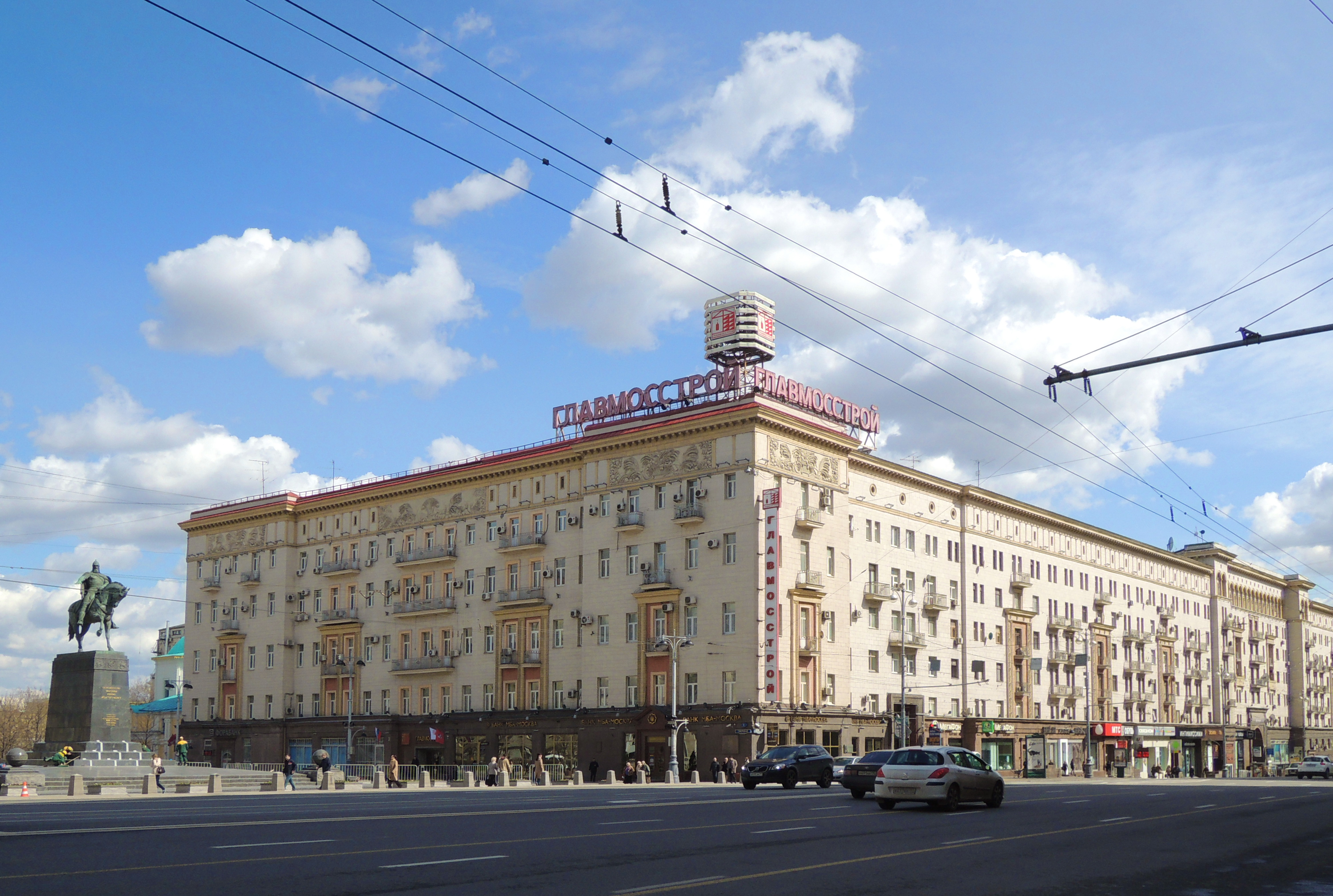 Тверская улица